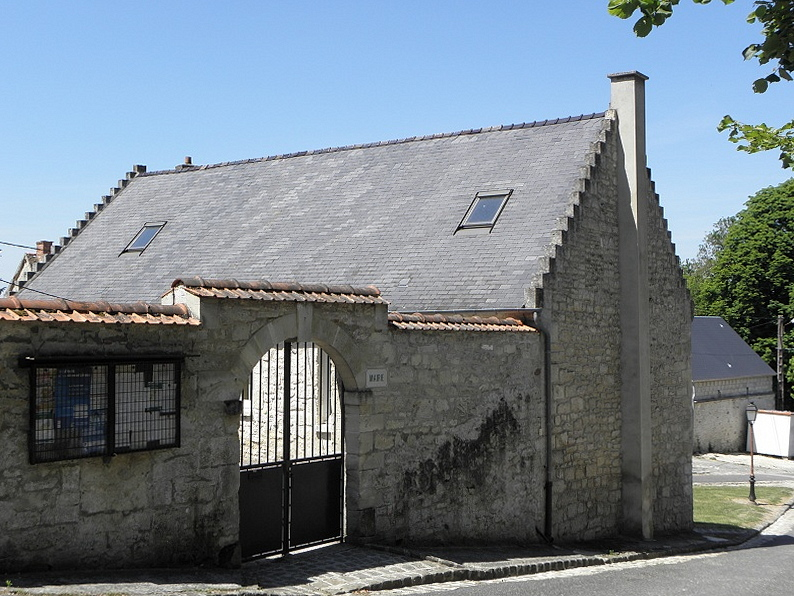 Mairie de Nouvion-le-Vineux (02).